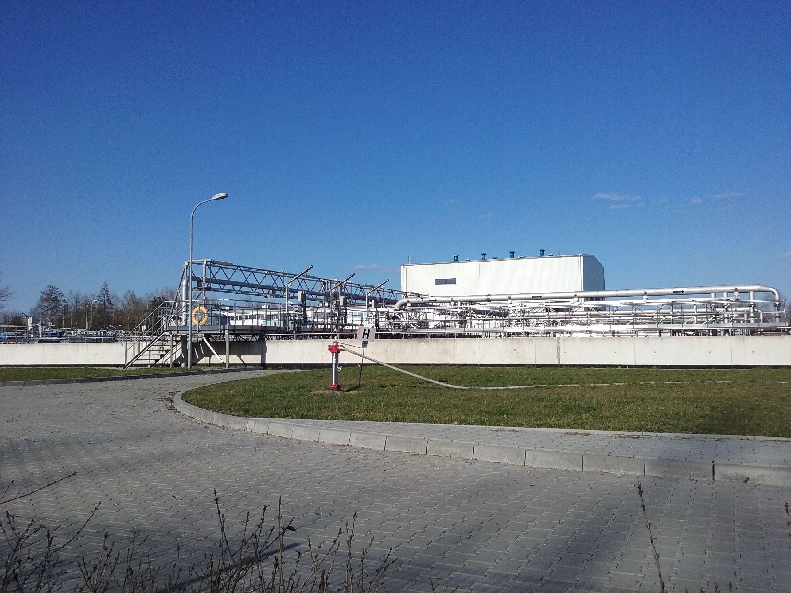 Tomaszów Mazowiecki w województwie łódzkim, PL,EU. Oczyszczalnia ścieków w Tomaszowie, ul. Henrykowska 2. CC0